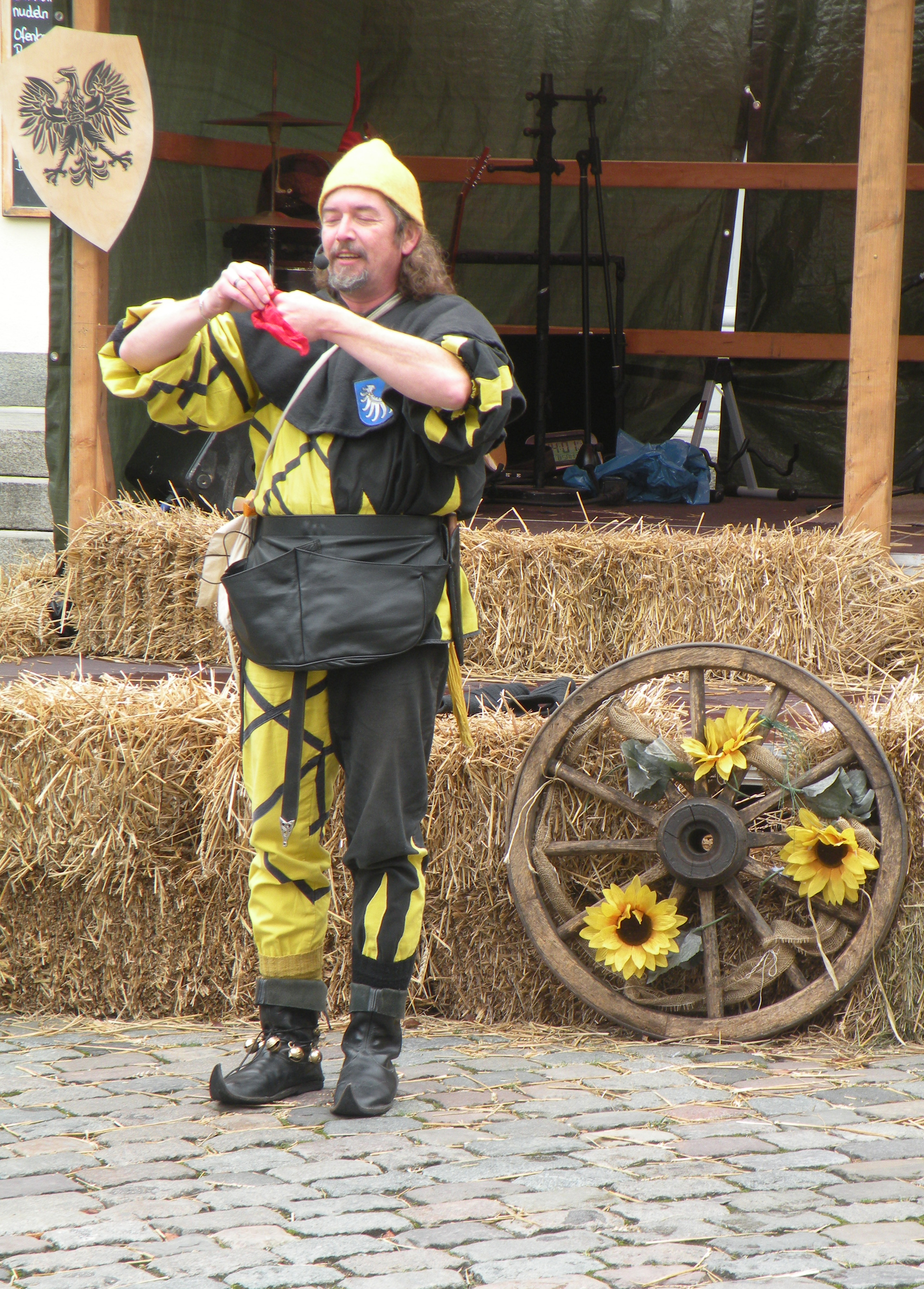 Juggler